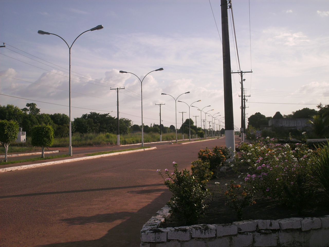 Avenida Dr. Zanny, na cidade de Caracaraí, Roraima.